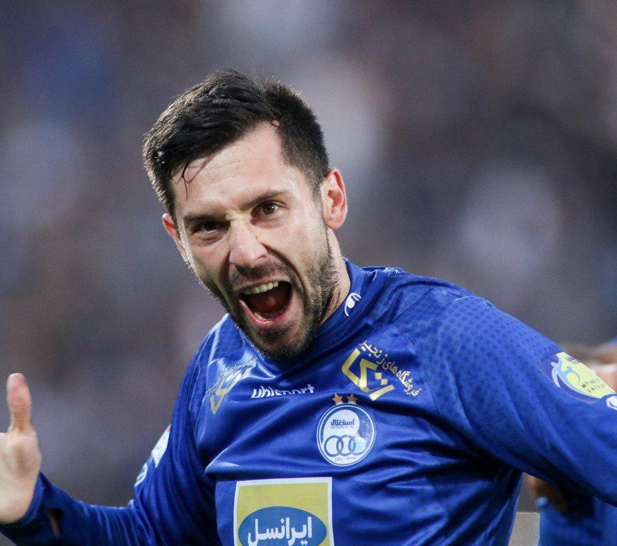 نگاره‌ای از دیدار دو تیم استقلال و صنعت نفت آبادان در ۱۴ آبان ۱۳۹۸ در ورزشگاه آزادی که تیم استقلال با نتیحه ۵-۰ پیروز دیدار شد. (مشاهده گزارش بازی)